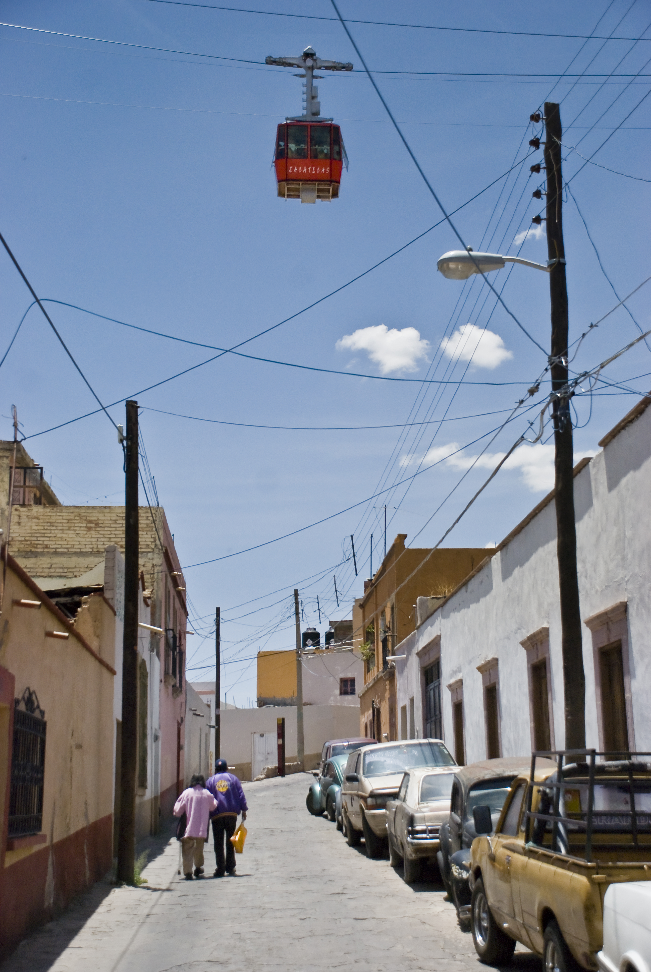 tele-. (Del gr. τηλε-). 1. elem. compos. Significa 'a distancia'. Teléfono, televisión. feérico, ca. 1. adj. Perteneciente o relativo a las hadas. Se le nombra Telefeérico por su forma como de hada que pasa,con vuelo raudo, controlada a distancia.